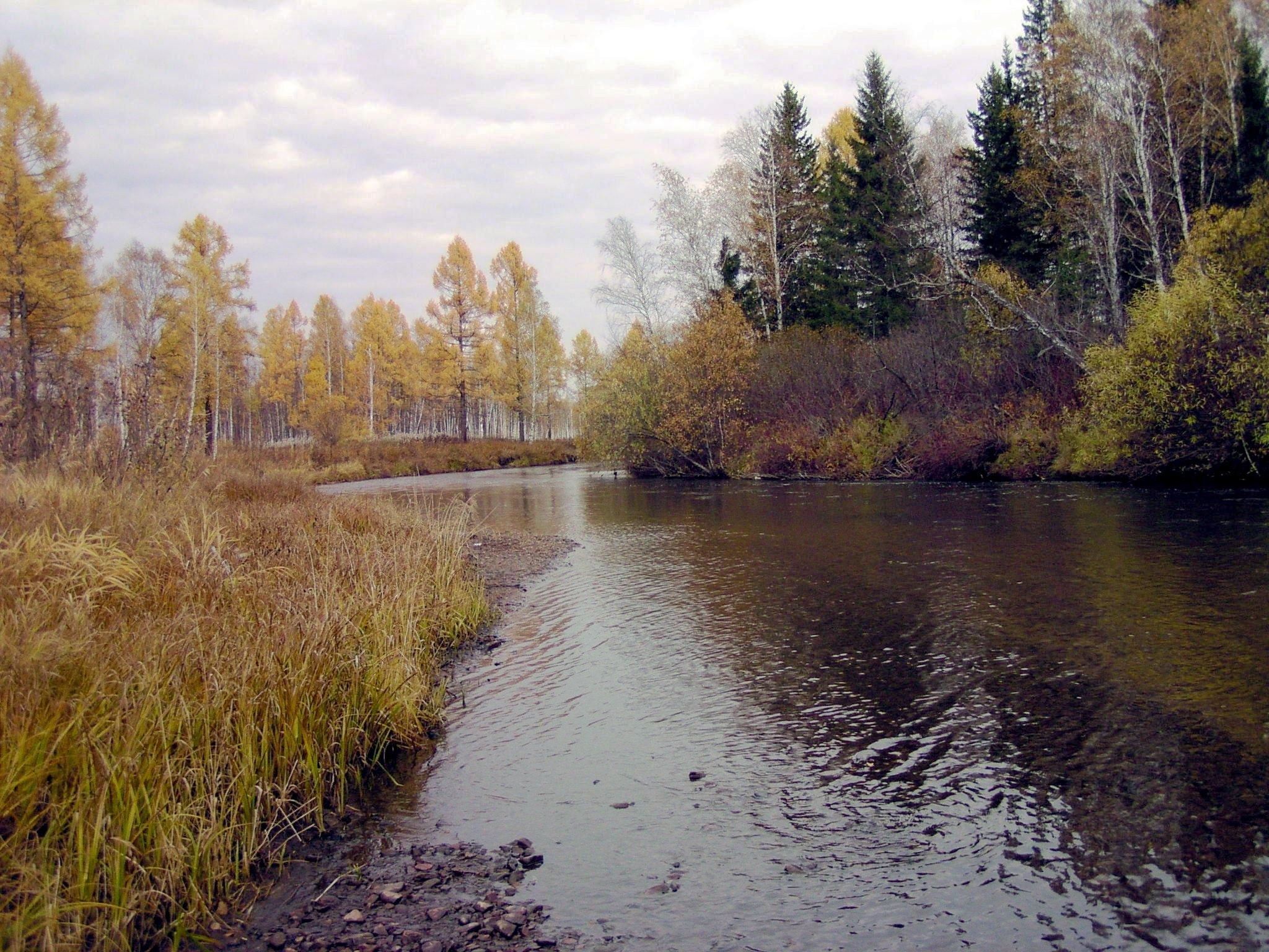 Анжа